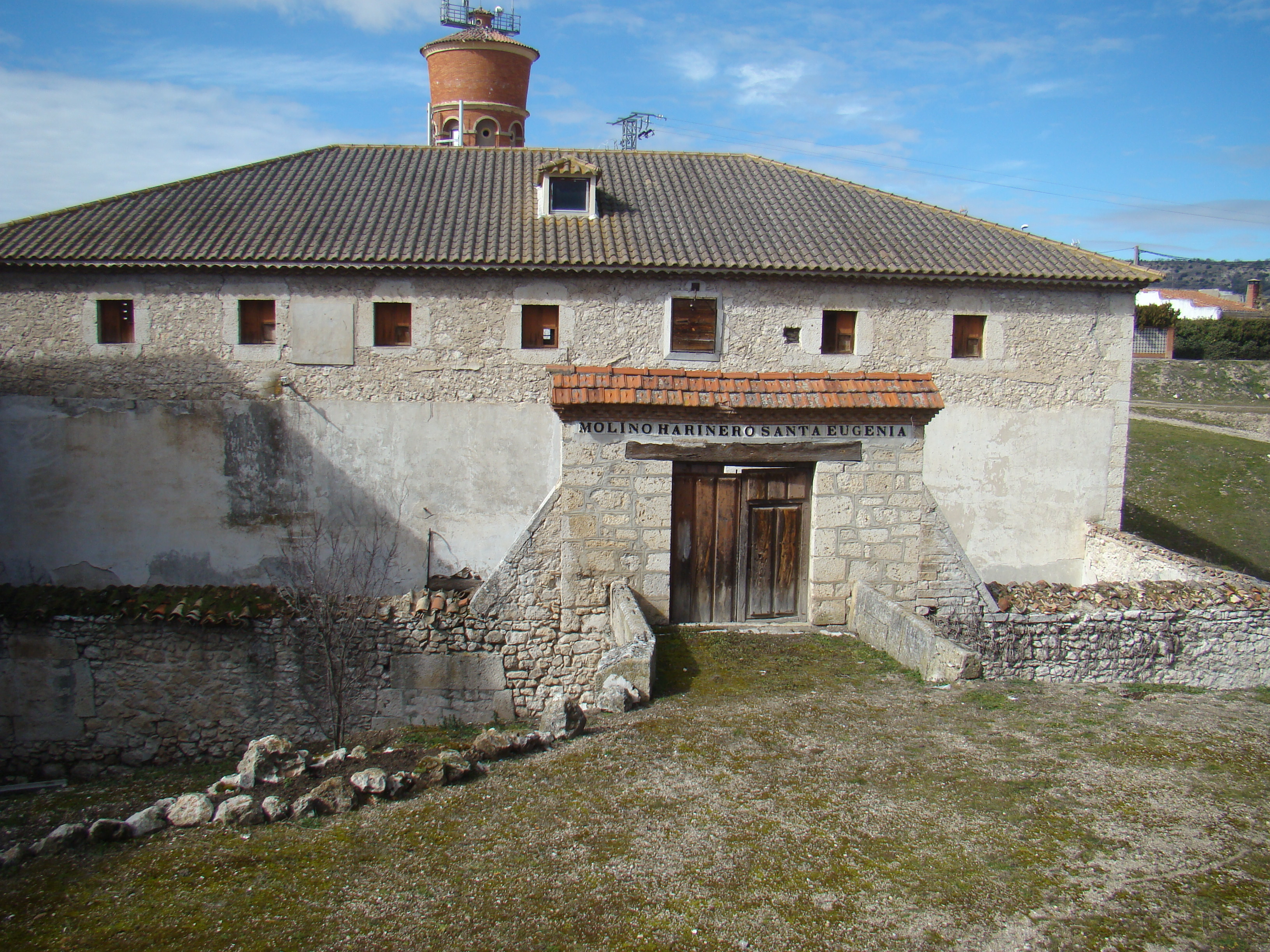 Sardón de Duero, Valladolid, España. Complejo arquitectónico del molino de una fábrica de papel construido en 1814 por el industrial Millán Alonso Tejada. En los años 30 del siglo XX se transformó en molino de harina con el nombre de Santa Eugenia. Está construido sobre el arroyo Valimón.